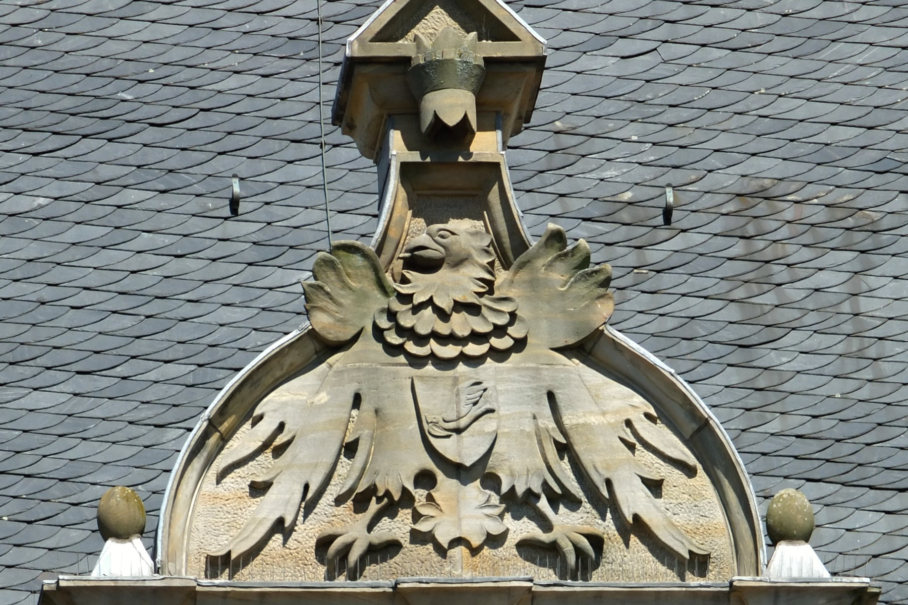 Adler mit Krone u. Friedenstaube auf Wappen am Frontgiebel des Bürgerhauses, Hilden, Mittelstraße 40